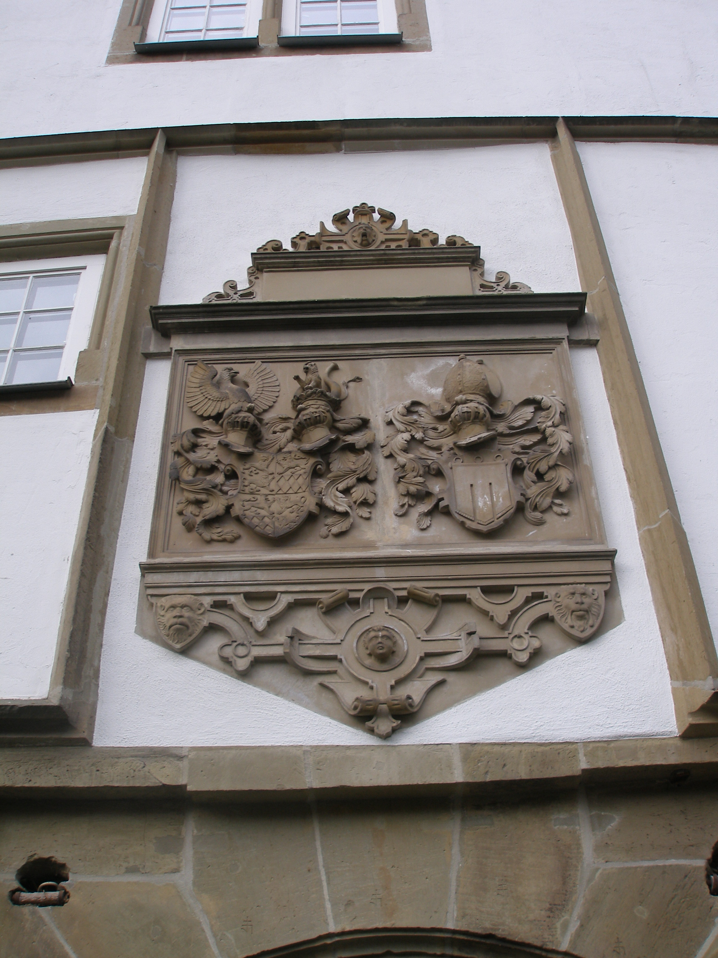 Wappen am Schloss Pfedelbach Eberhard von Hohenlohe-Waldenburg Agathe Gräfin von Tübingen